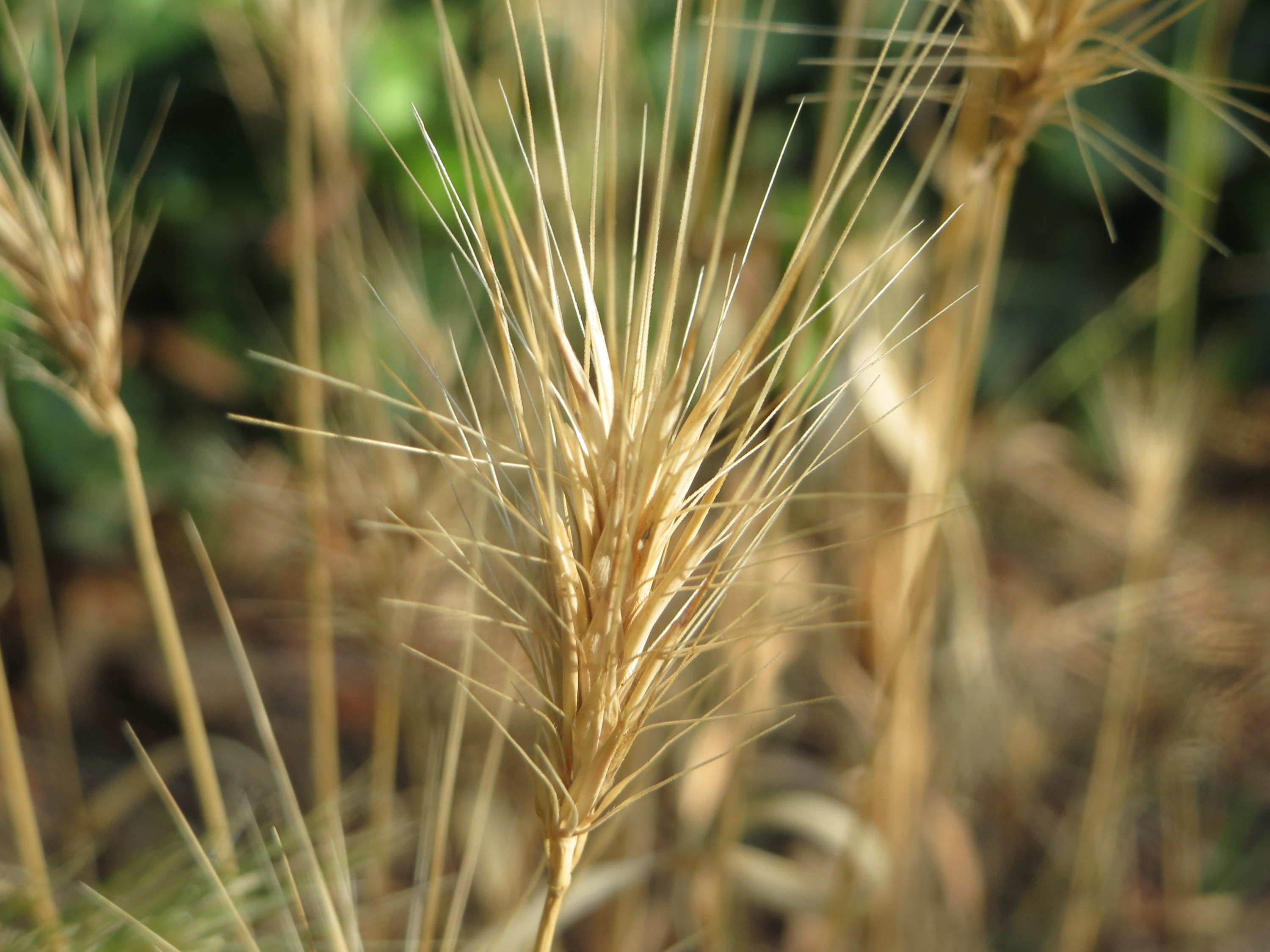 Mäuse-Gerste (Hordeum murinum) in Hockenheim